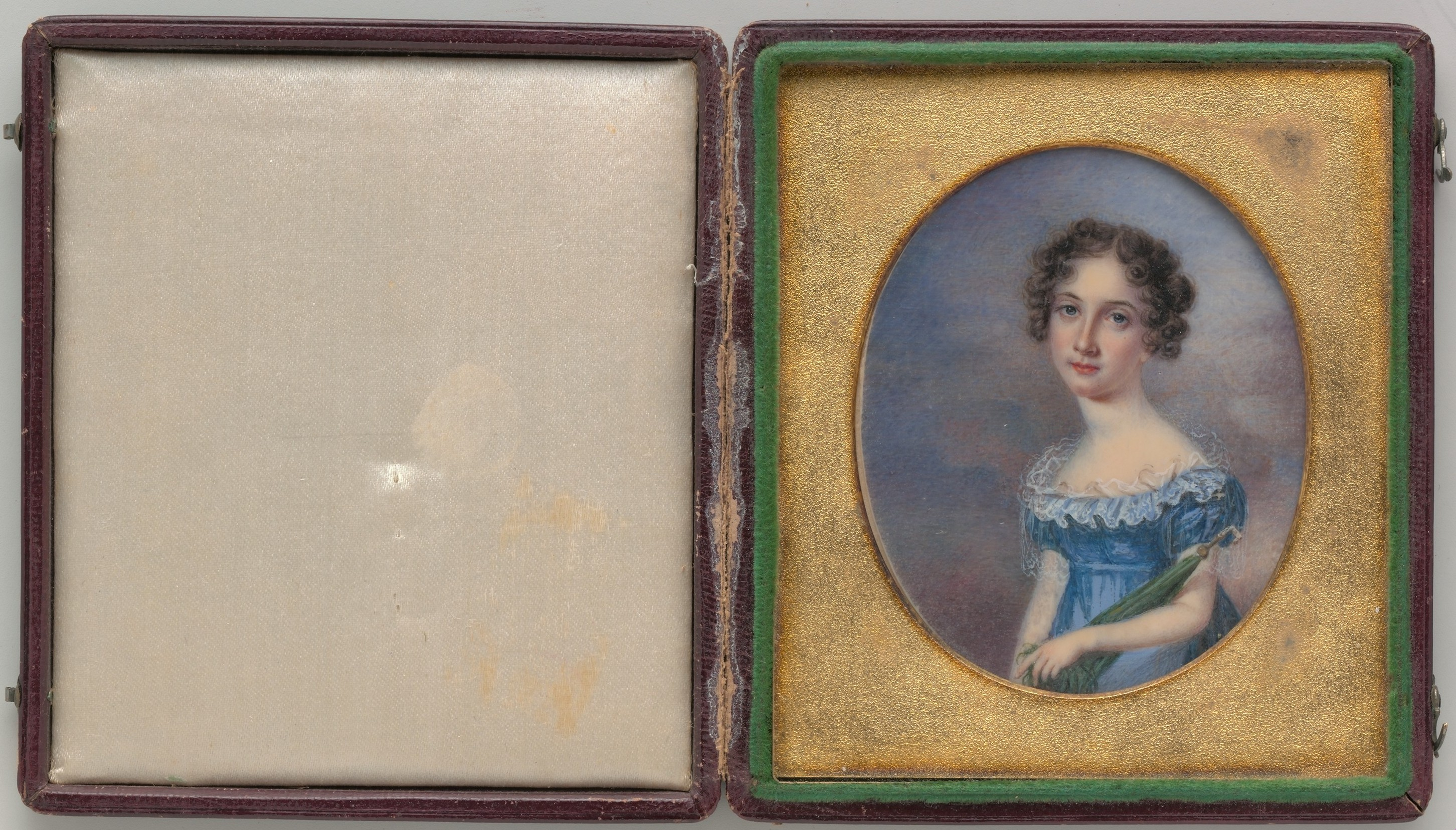 Painting, miniature; Paintings